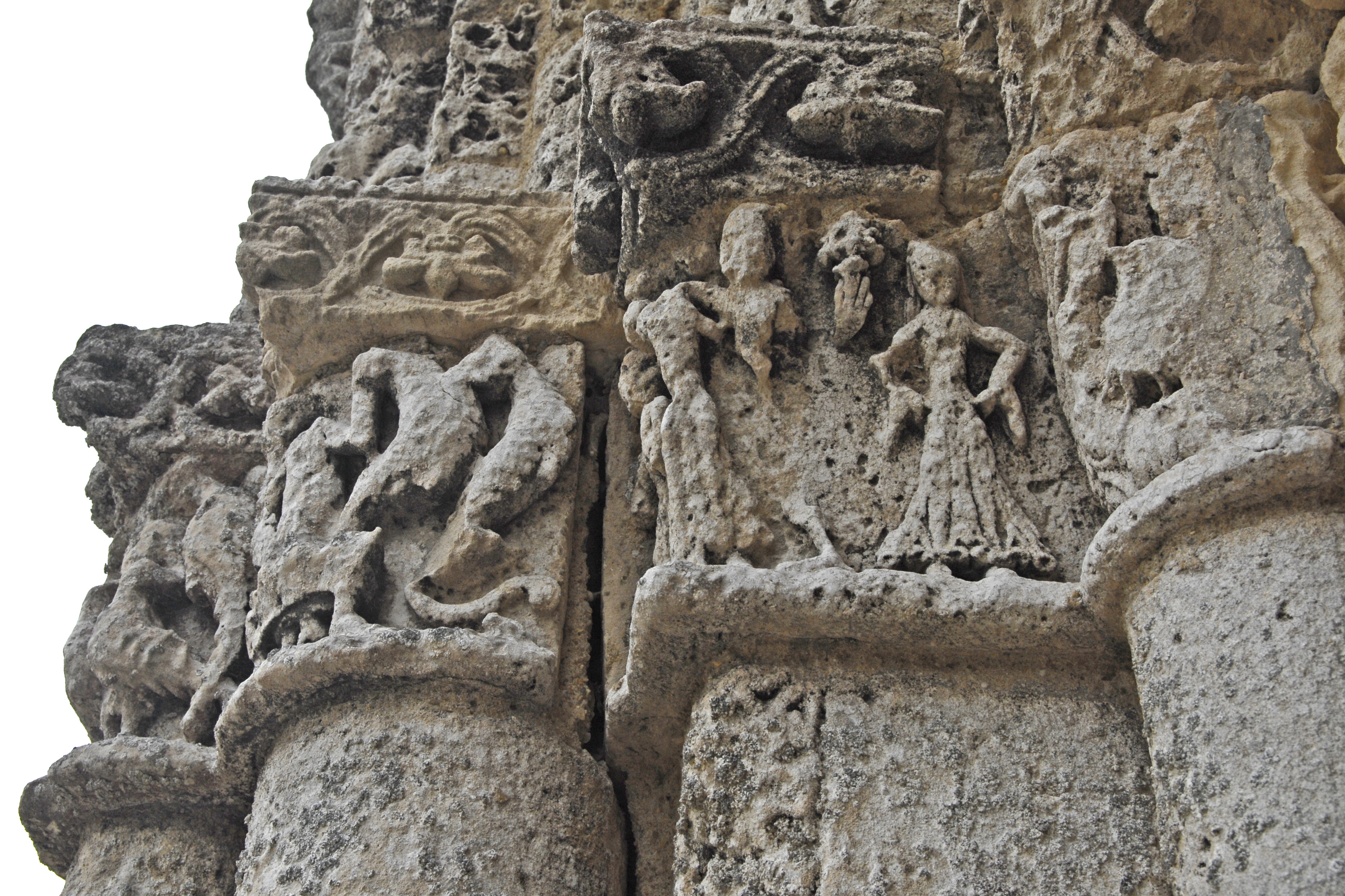 Sainte-Radegonde-Talmont-sur-Gironde, Kapitelle Hauptportal links